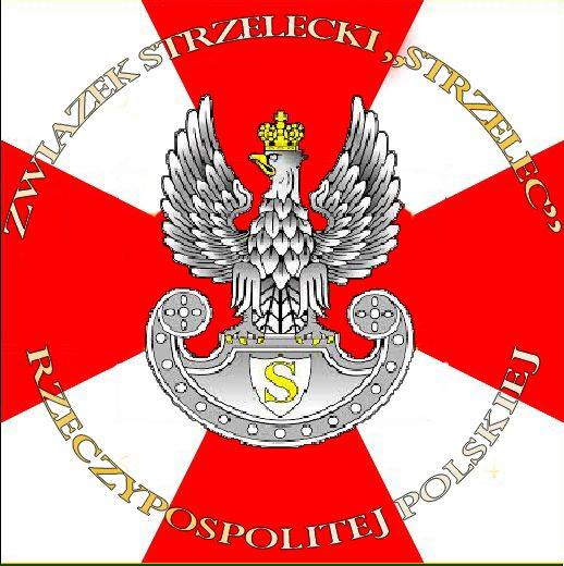 rewers